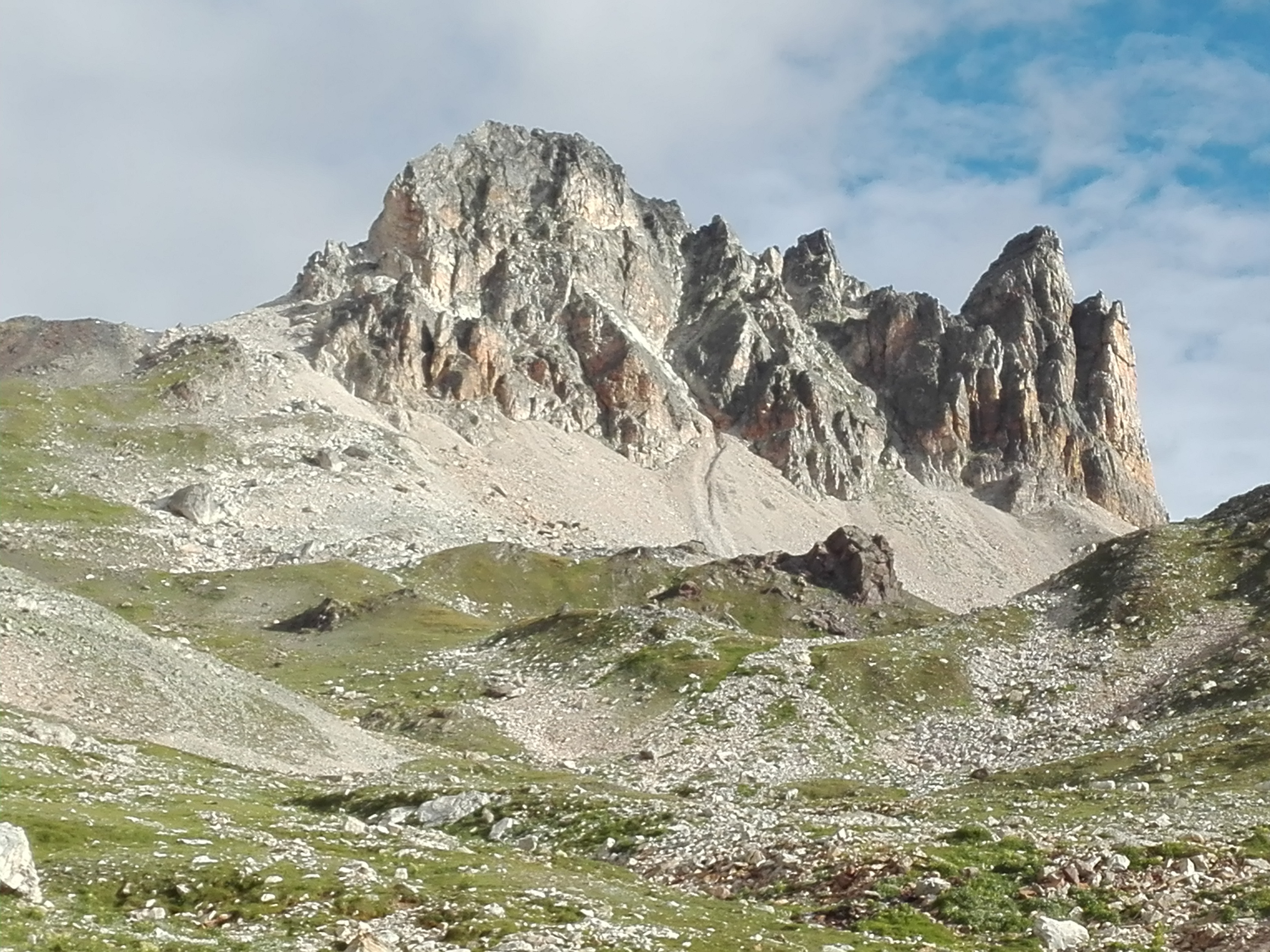 Vista della montagna salendo il vallone del Peyron